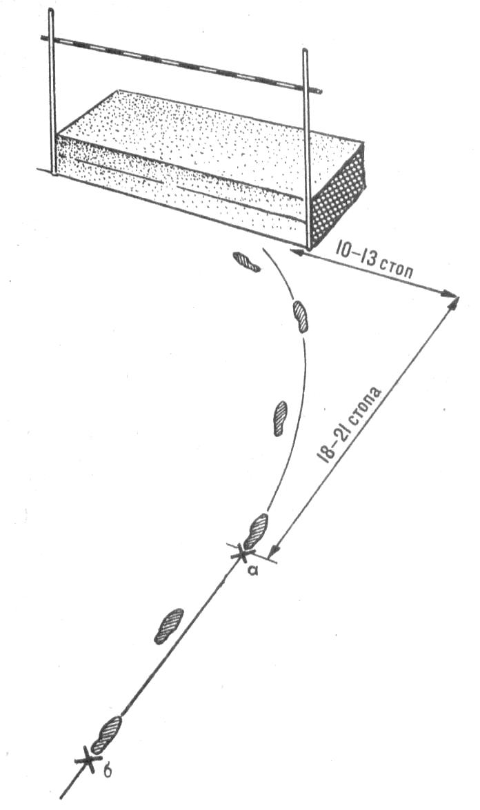 сектор для прыжка в высоту с разбега